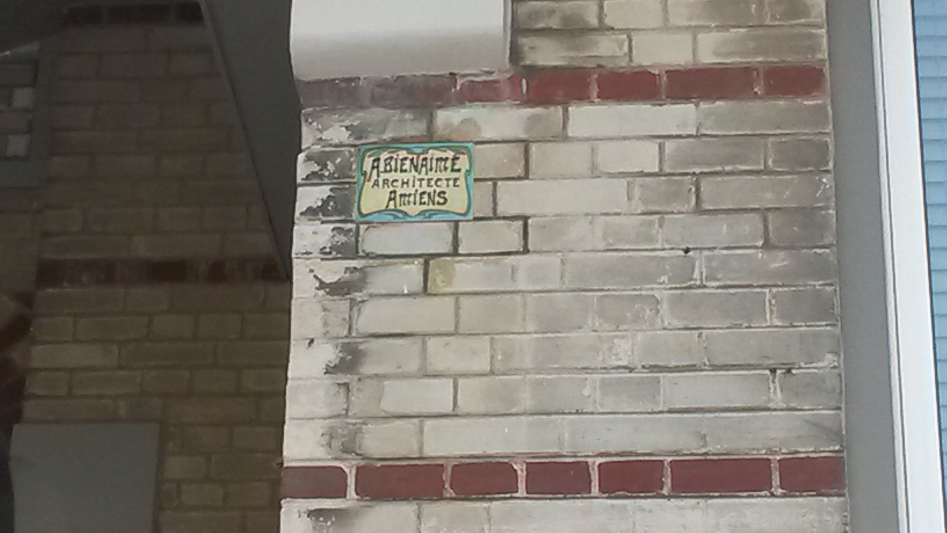 Le Touquet-Paris-Plage 2019